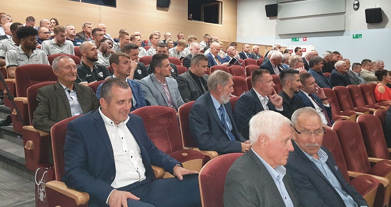 Uroczysta Gala na 70-lecie Spójni Stargard